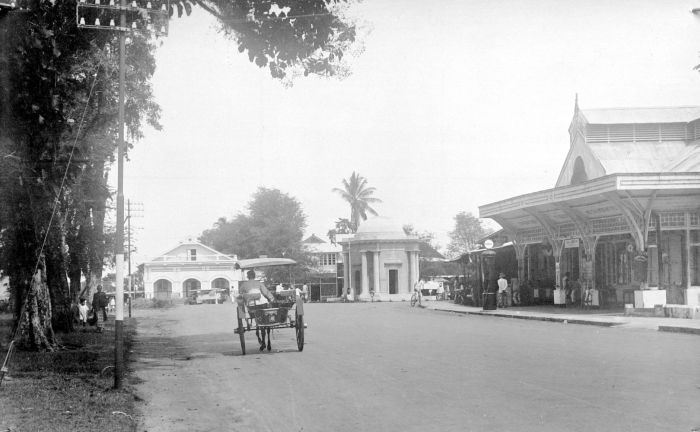 Repronegatief. Stadsgezicht met Parr-monument, Benkoelen